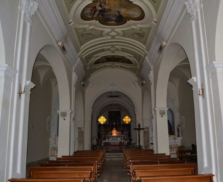 Chiesa della Santissima Annunziata (Ceppaloni) sec. XVI - interno.